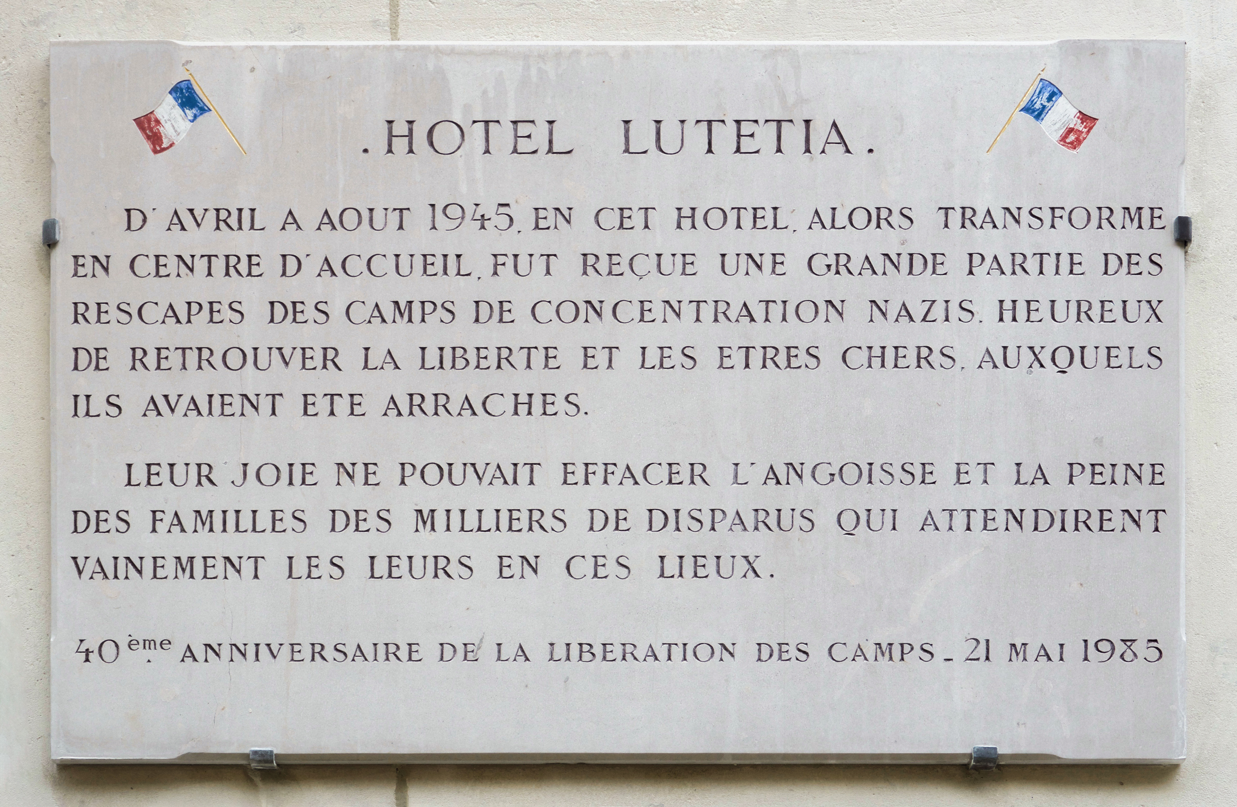 Plaque devant l'hôtel Lutetia (Paris, 6e), côté boulevard Raspail, sur l'après-Seconde Guerre mondiale.